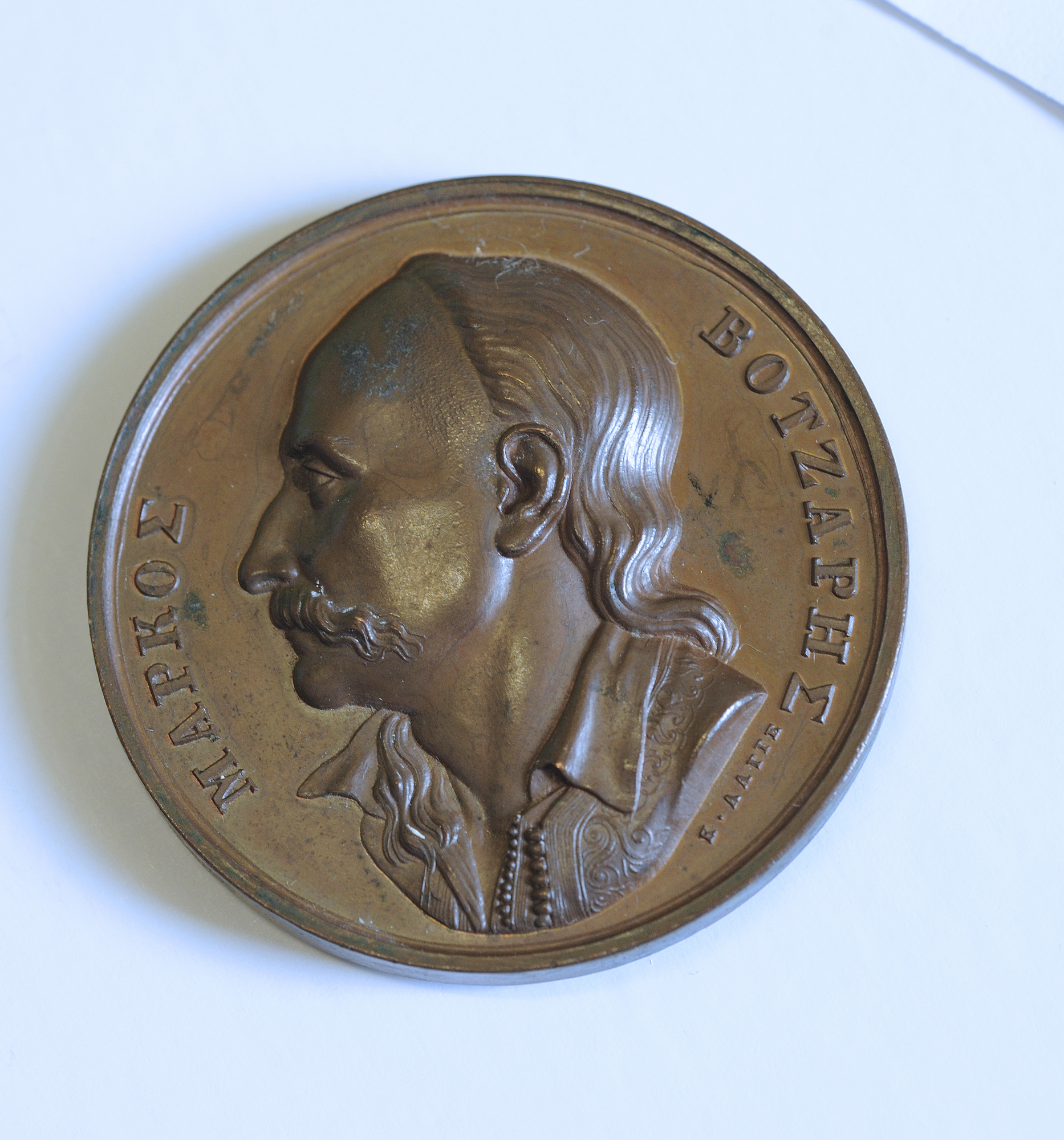 Ο Μάρκος Μπότσαρης. Αναμνηστικό μετάλλιο φιλοτεχνημένο από τον γλύπτη Κόνραντ Λάγγε το 1836. Εθνικό Ιστορικό Μουσείο.